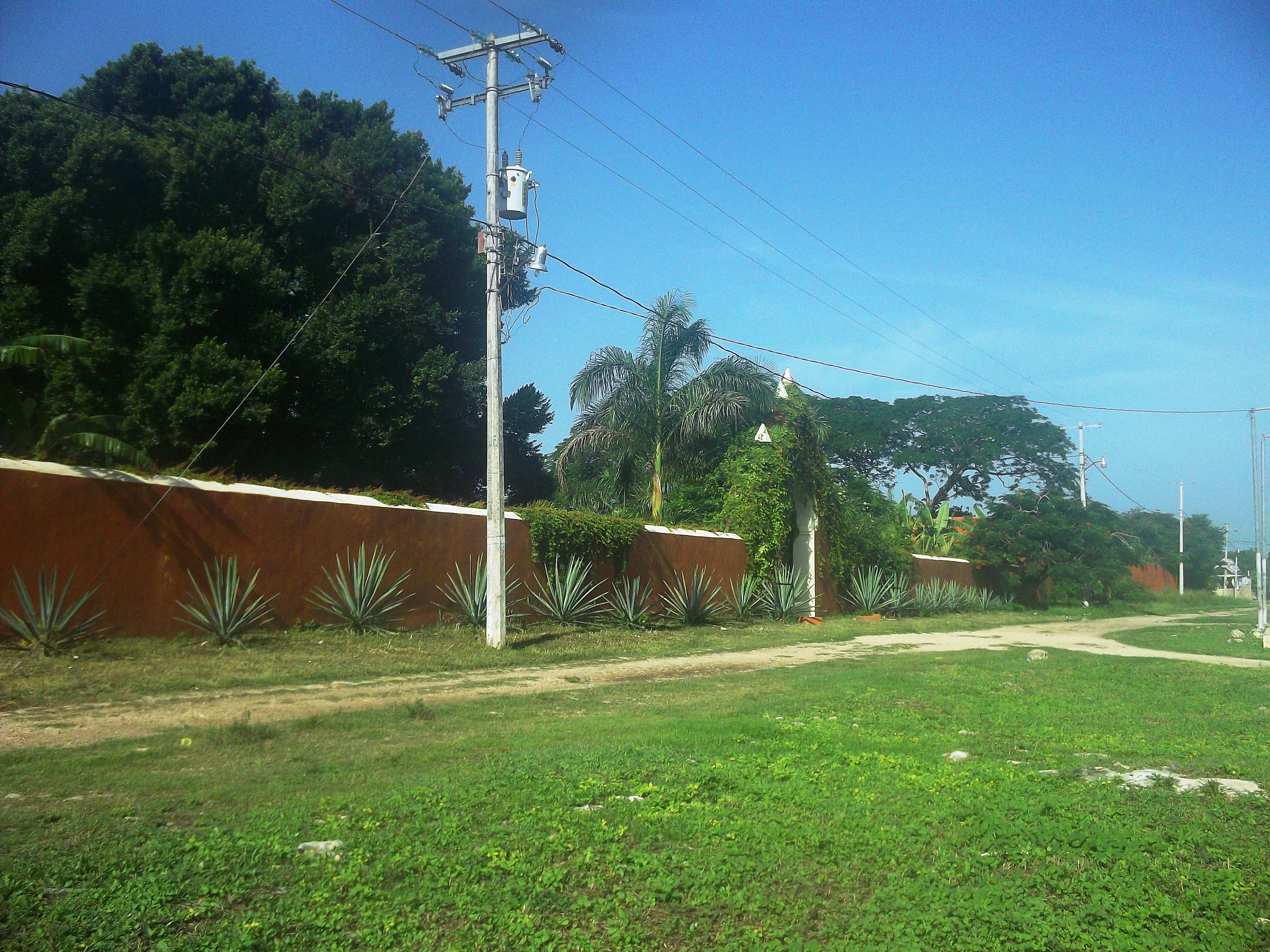 Vista de la hacienda de Pozo de Dzibikak, Yucatán..